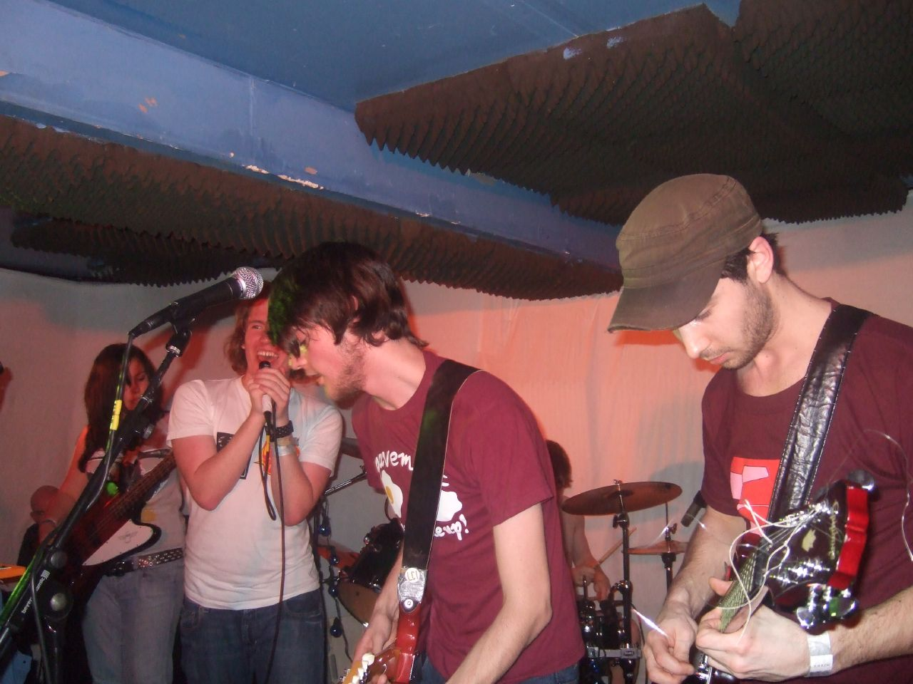 Los Campesinos! Bristol Louisiana Ellen, Gareth, Neil, Tom